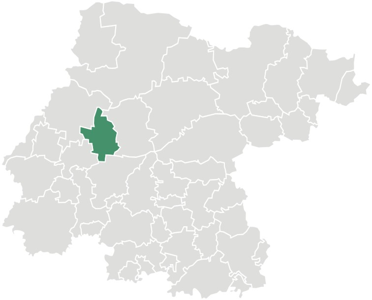 Mapa del municipio de Silao en el estado mexicano de Guanajuato